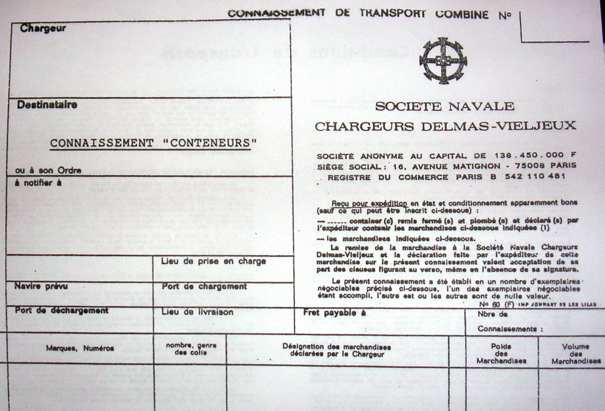 Extrait d'un connaissement conteneurs de l'ancienne Société Navale Chargeurs Delmas-Vieljeux